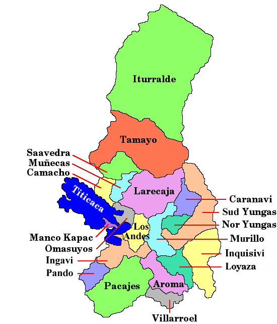 Carte du département de La Paz en Bolivie